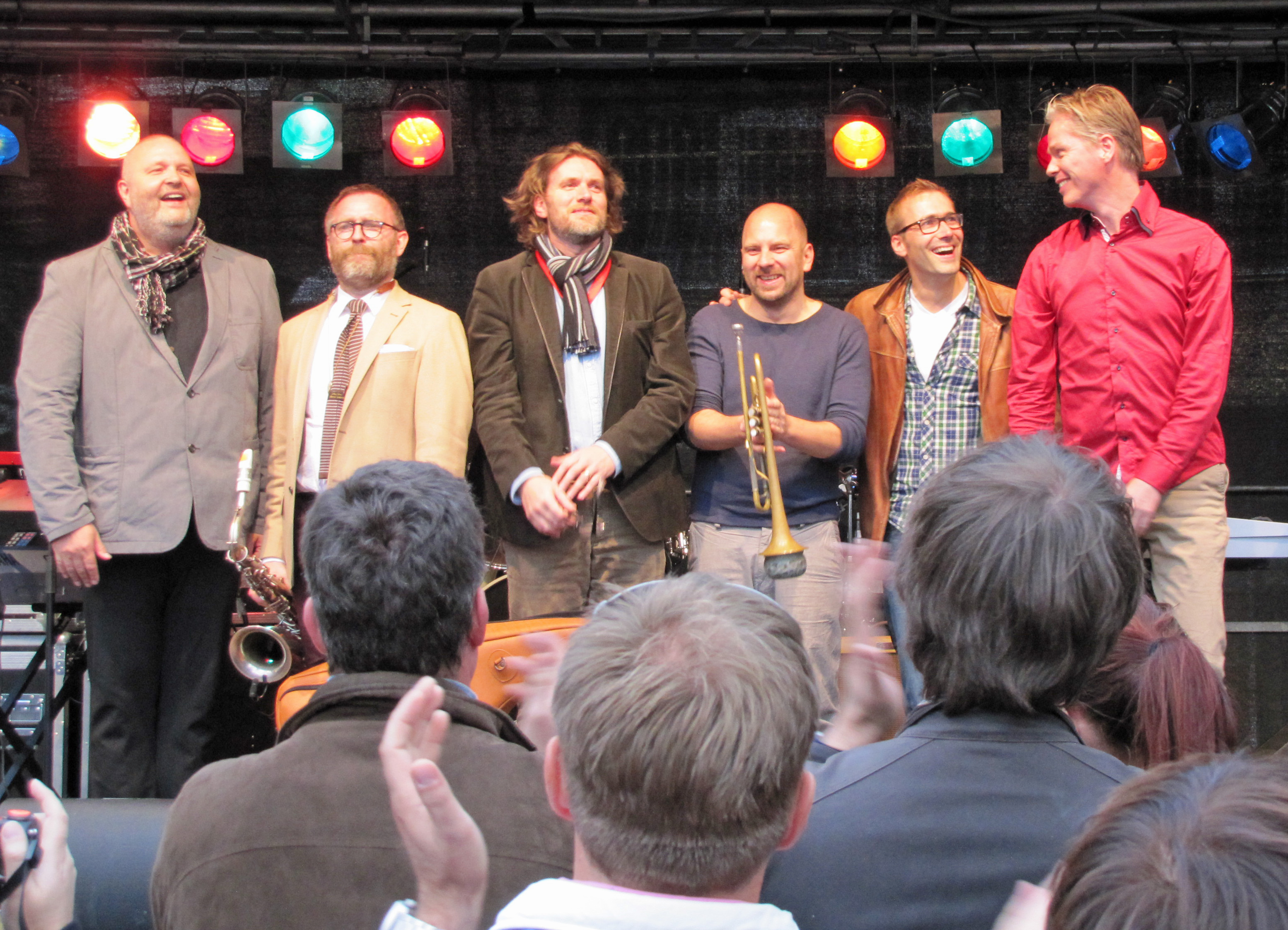 Mezzoforte (Johann Asmundsson, Oskar Gudjonsson, Eythor Gunnarsson, Sebastian Studnitzky, Bruno Müller und Gulli Briem), 2012 bei Jazz zum Dritten auf dem Römerberg in Ffm.